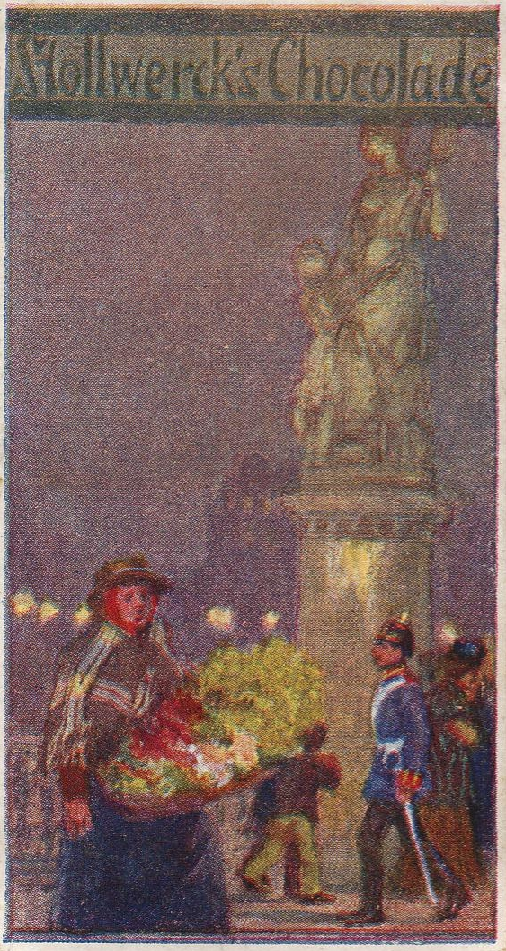 "Die Blumenfrau"